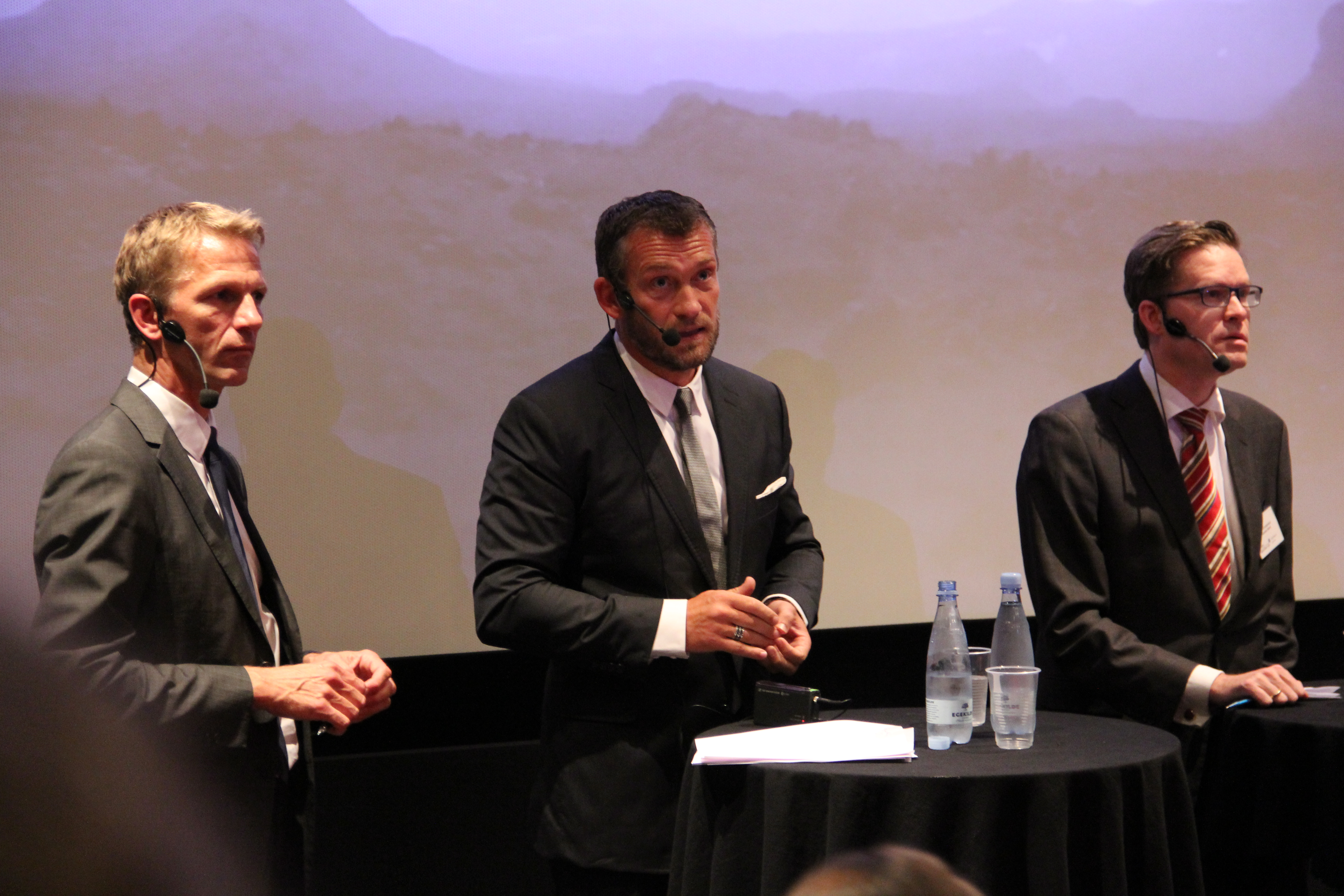 Børsens chefredaktør og administrerende direktør Anders Krab-Johansen, den islandske forretningsmand Björgólfur Thor Björgólfsson og Lars Christensen fra Danske Bank.